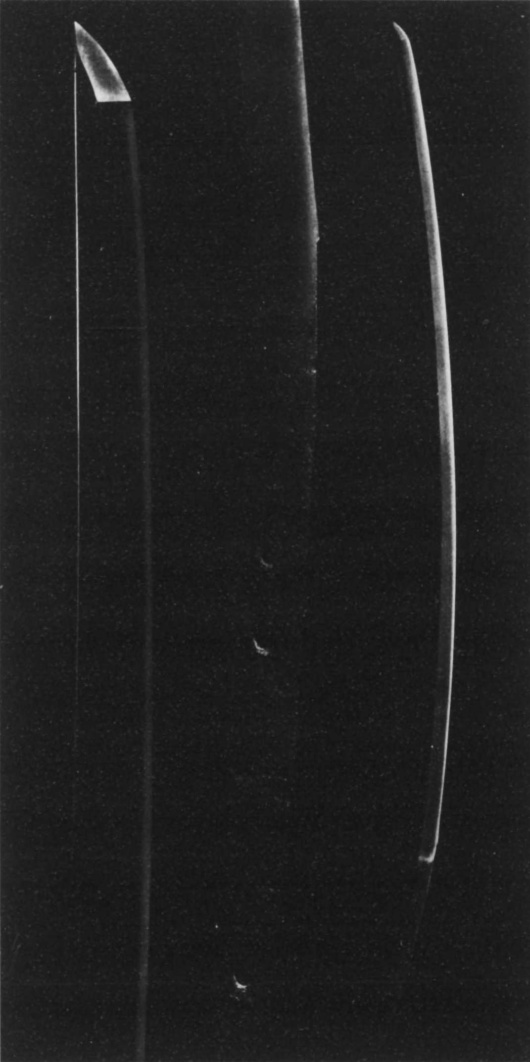 太刀 銘宗（以下不明）伝宗近